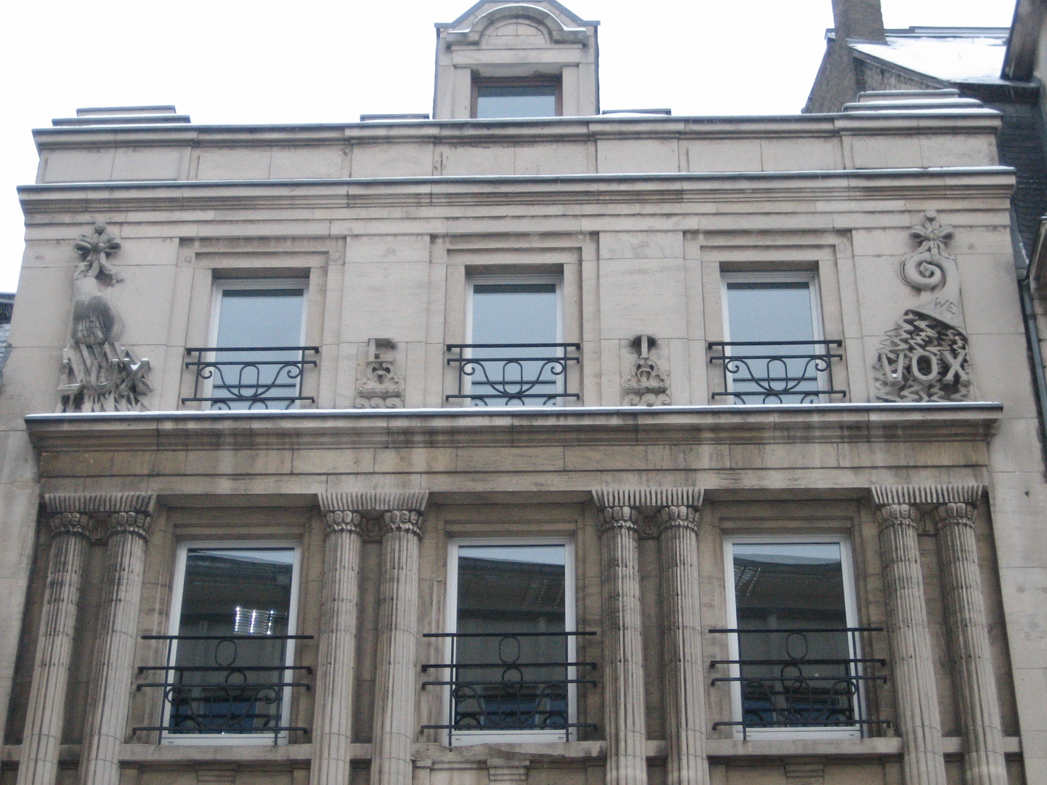 Sujet: Detail vun der Façade vum fréiere Ciné Capitole, an der Aler Avenue an der Stad Lëtzebuerg. Figuren "Lux" (Luucht) a "Vox" (Stëmm; Toun). Auteur vun der Foto: Zinneke, am Dezember 2010. Lizenz: CC-by-sa